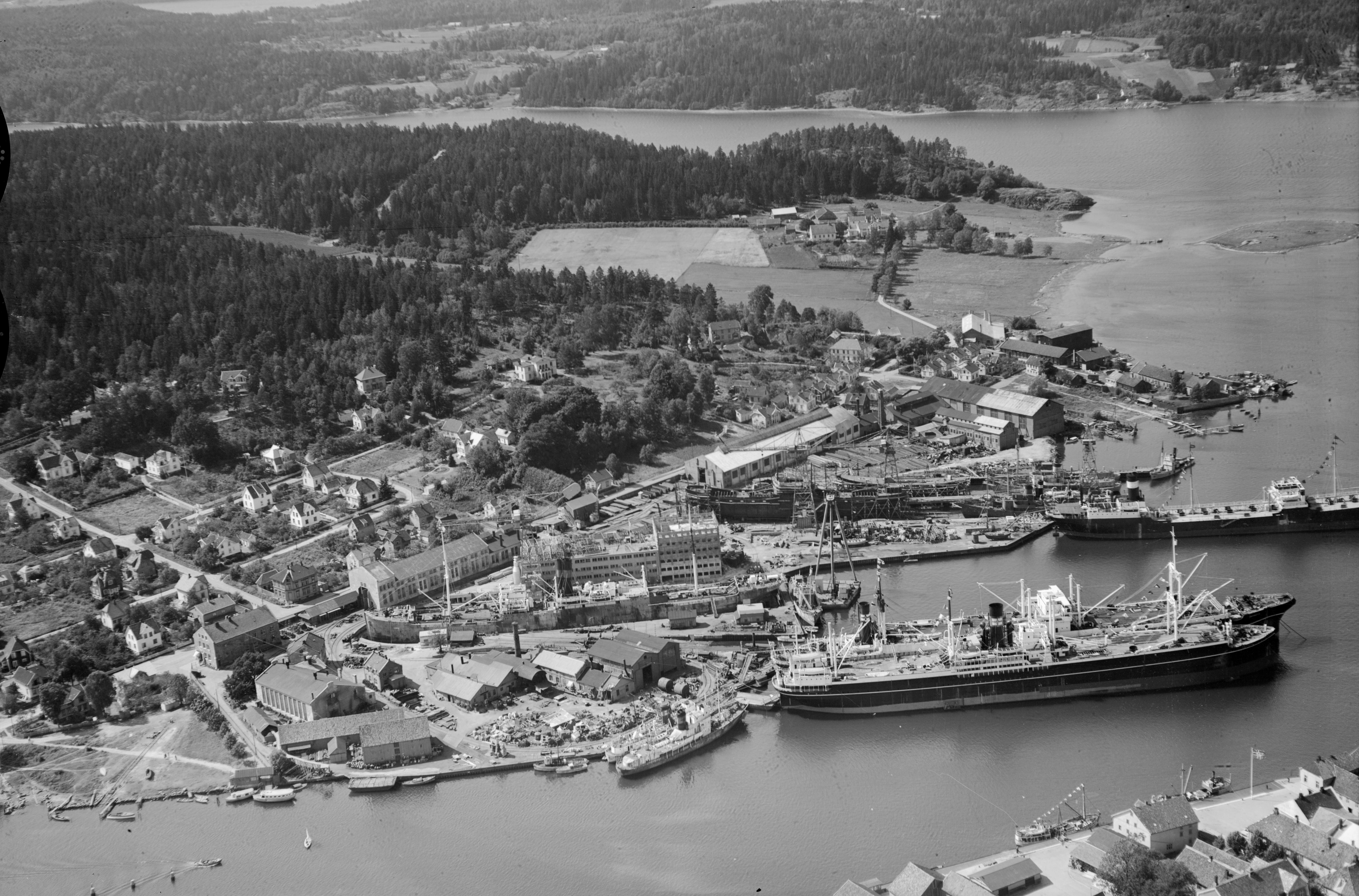 Widerøe skråfoto fra Nøtterøy kommune. Hvalkokeriene Pelagos og Antarctic